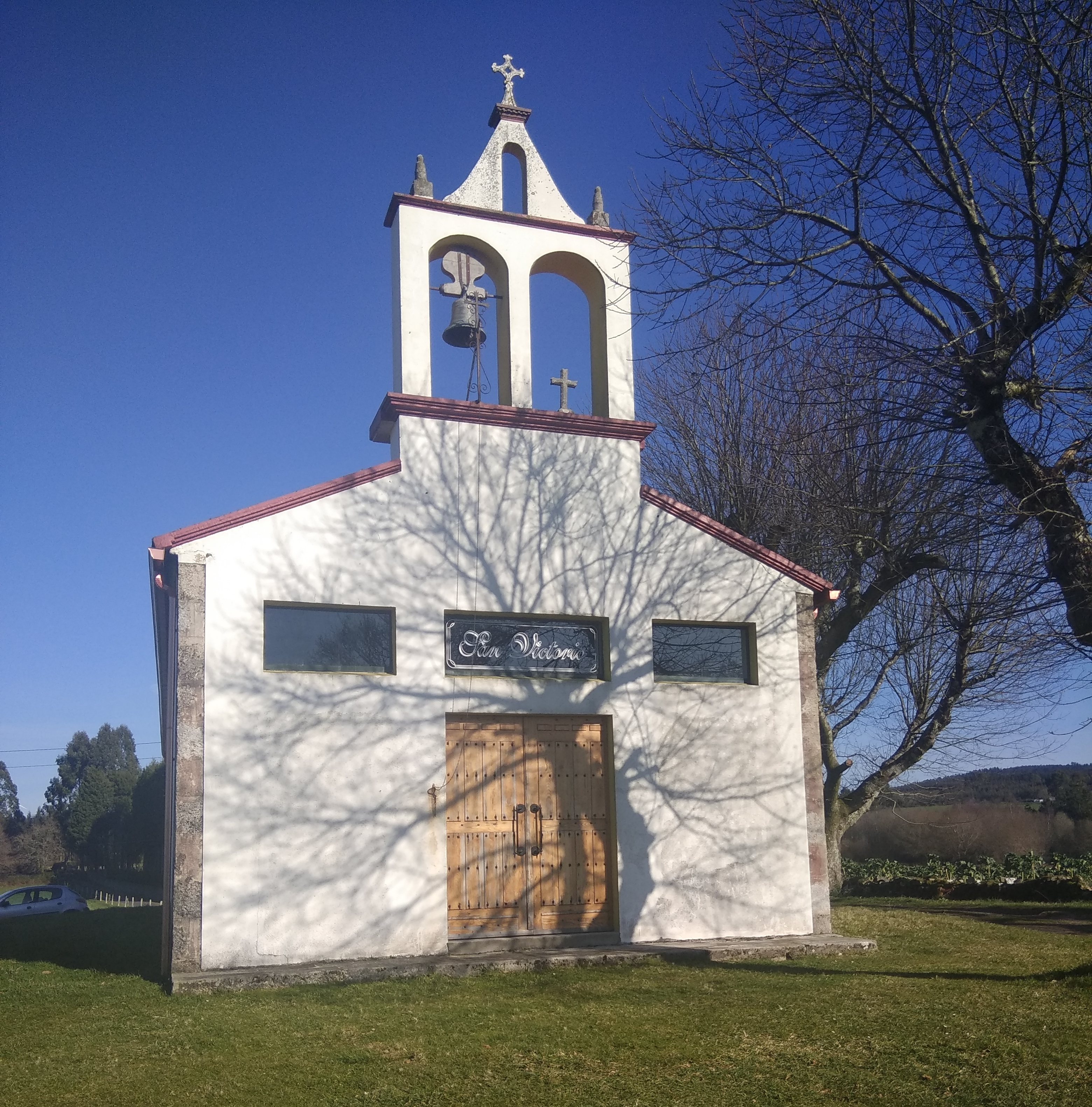 Capela de San Vitorio da Sabugueira (Grixalba, Sobrado, Galiza).